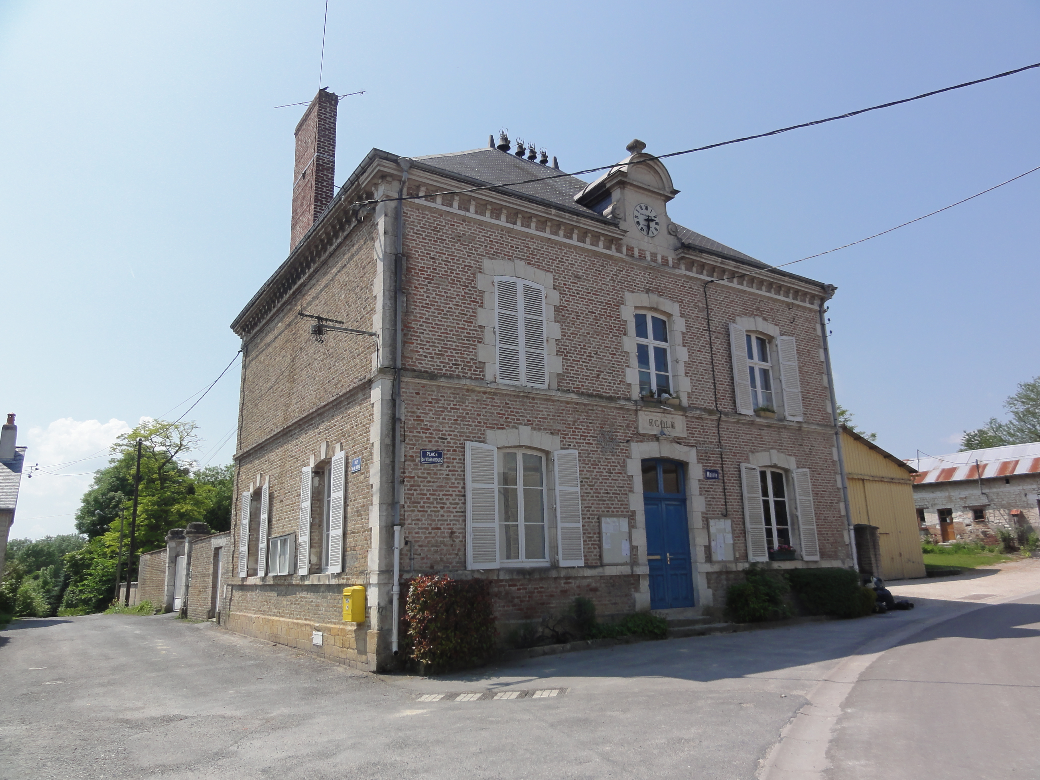 Saint-Fergeux (Ardennes) Mairie-école